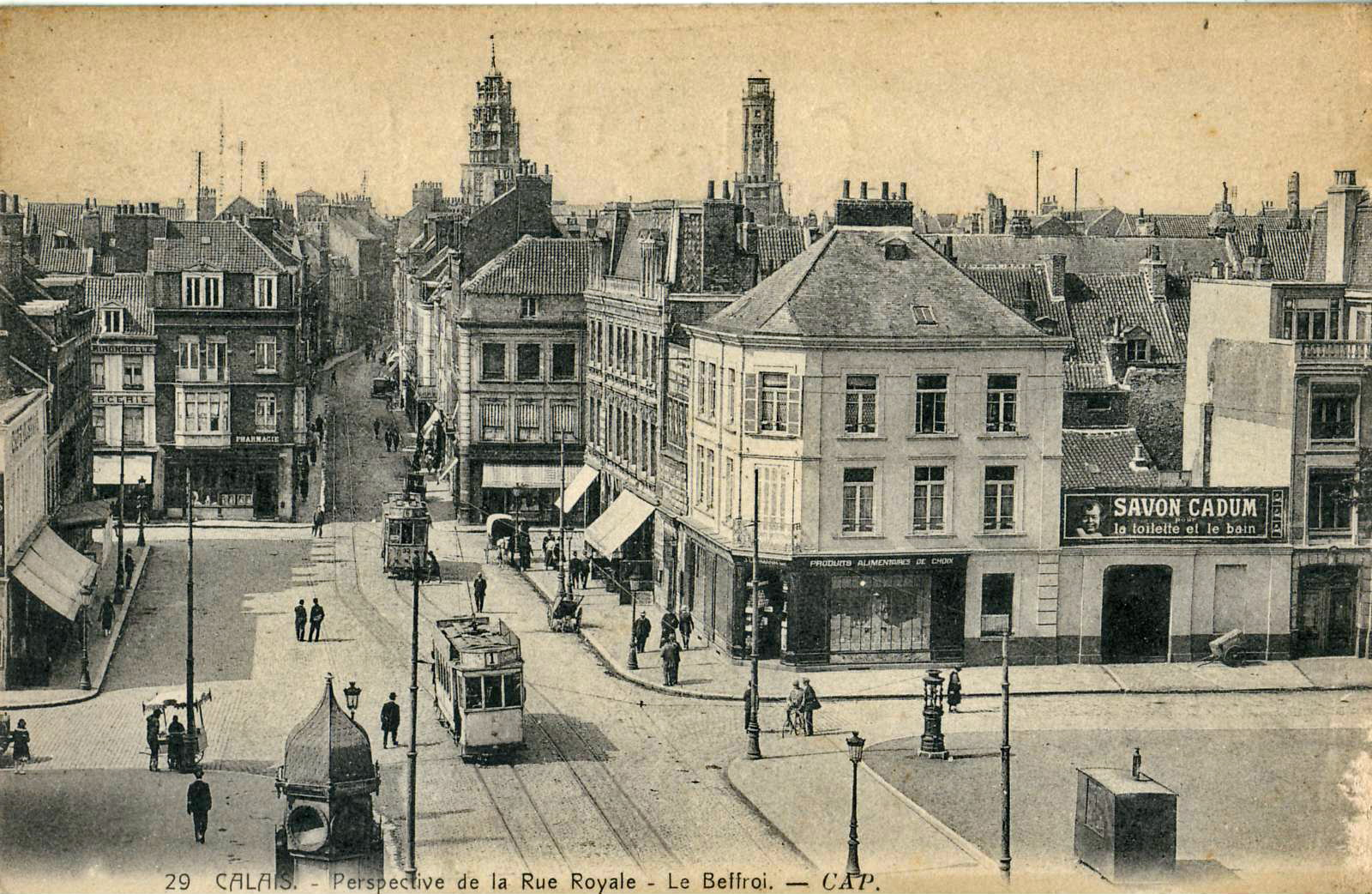 Carte postale ancienne éditée par CAP, n°29 :CALAIS - Perspective de la Rue Royale - Le Beffroy